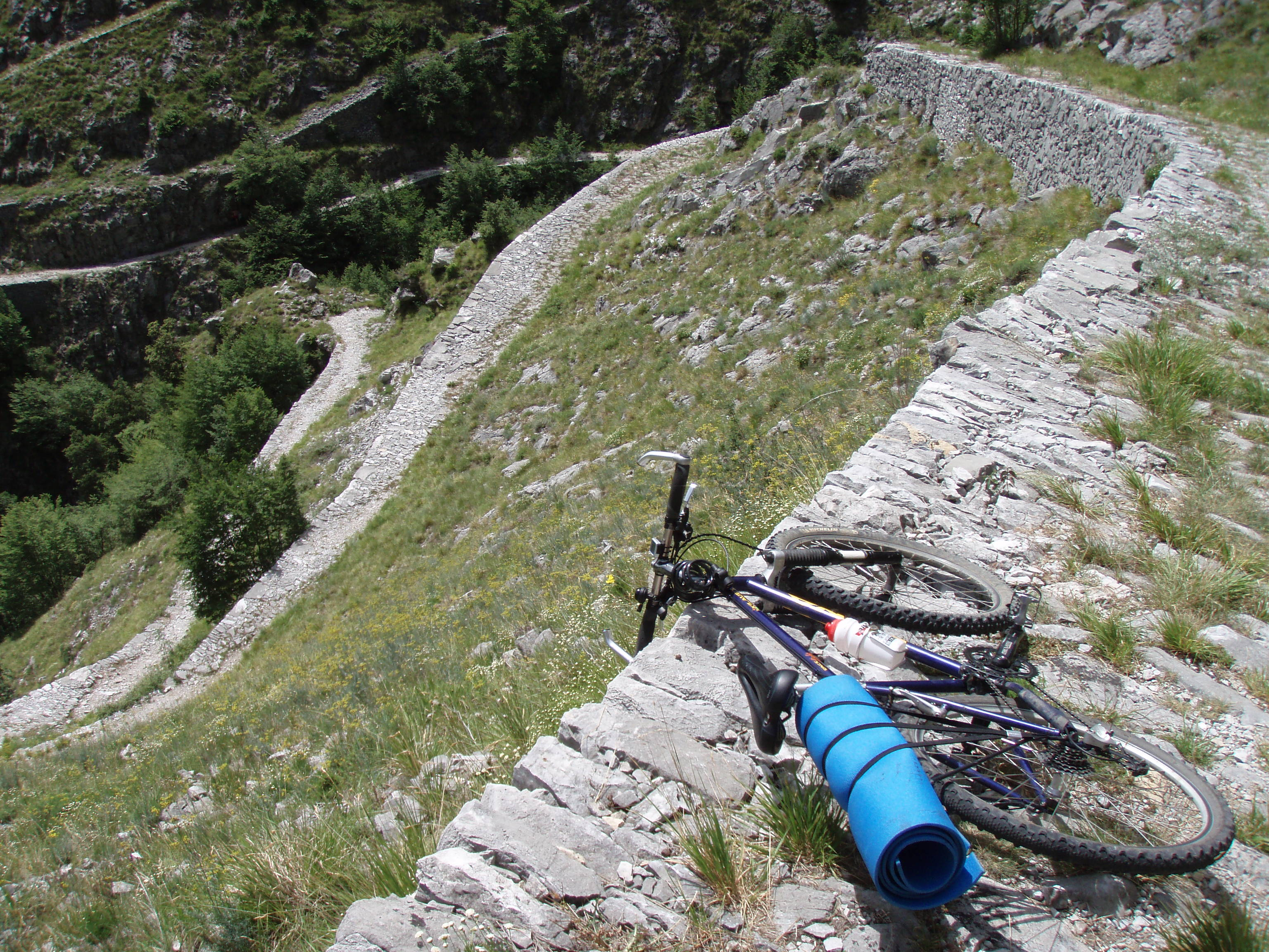 Discesa della via Vandelli verso Resceto dal monte Tambura (Olympus Myu 720 SW)